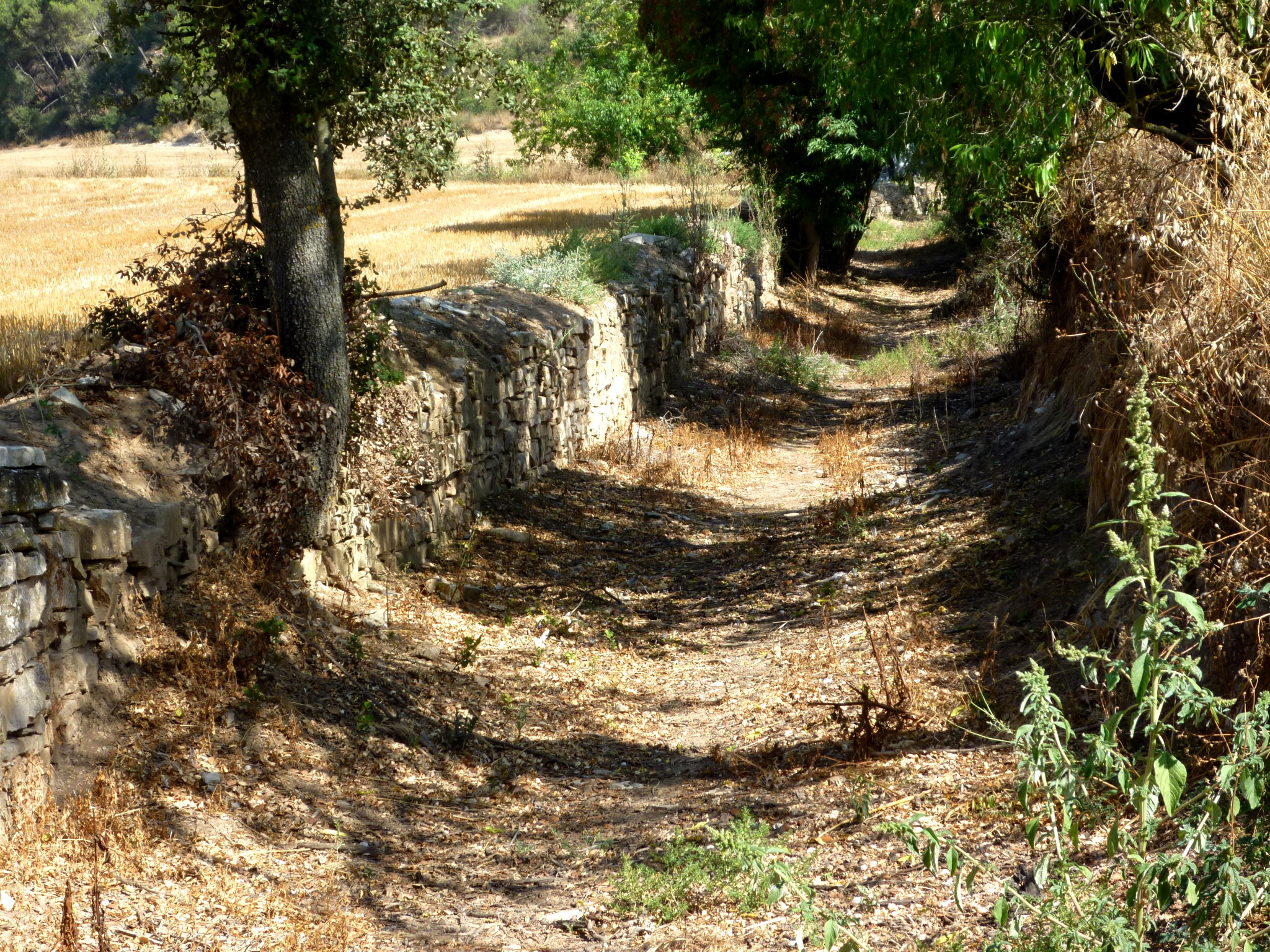 Font del Pastor de Sant Domí (Sant Guim de Freixenet): camí d'accés a la font